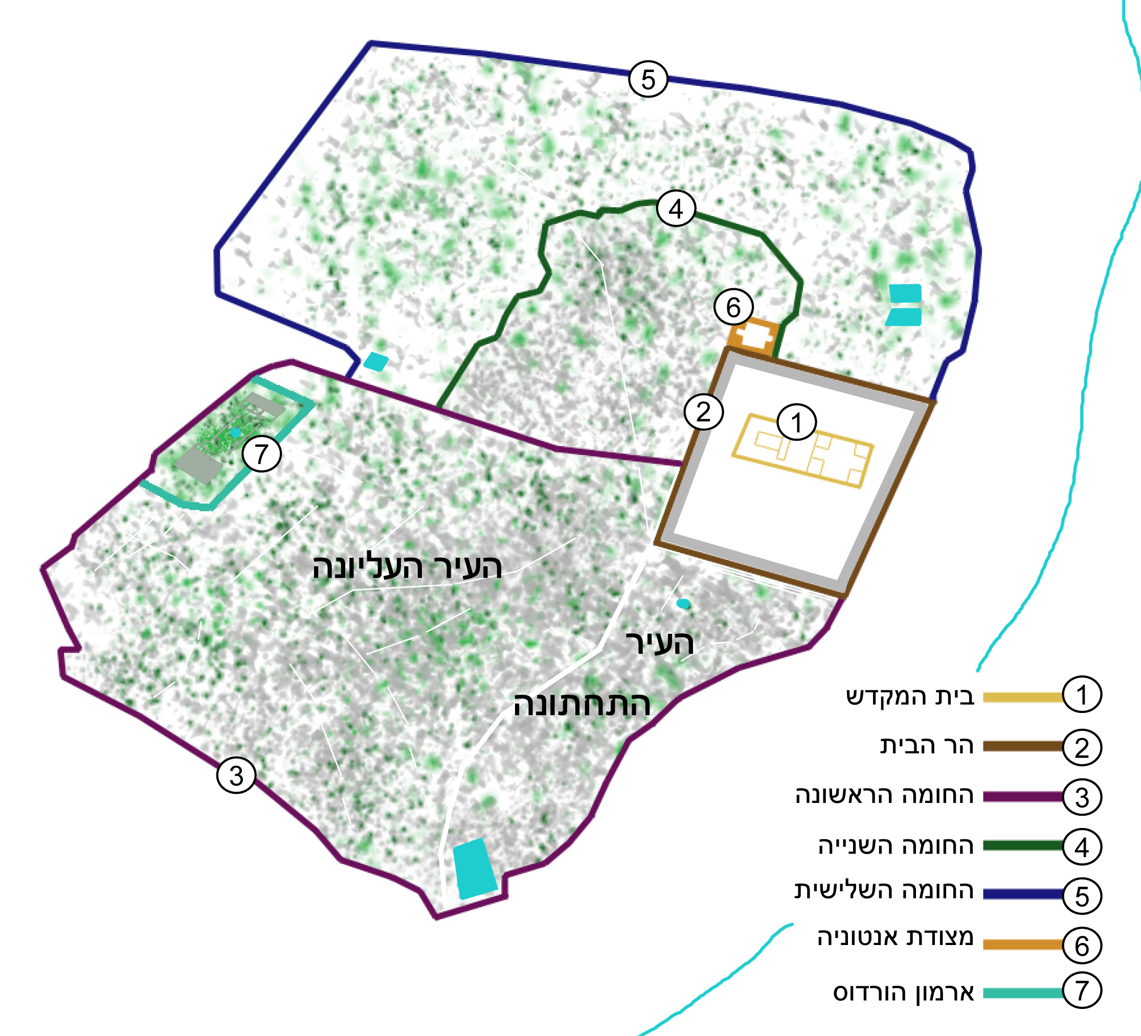 ירושלים בשנת 70 (ערב המצור) עם מבני ואתרי העיר